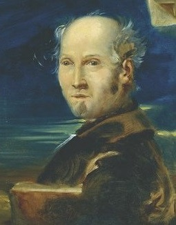 Autoritratto di Fortunato Duranti, donato dall'artista al Comune, e conservato presso la Pinacoteca Civica di Montefortino